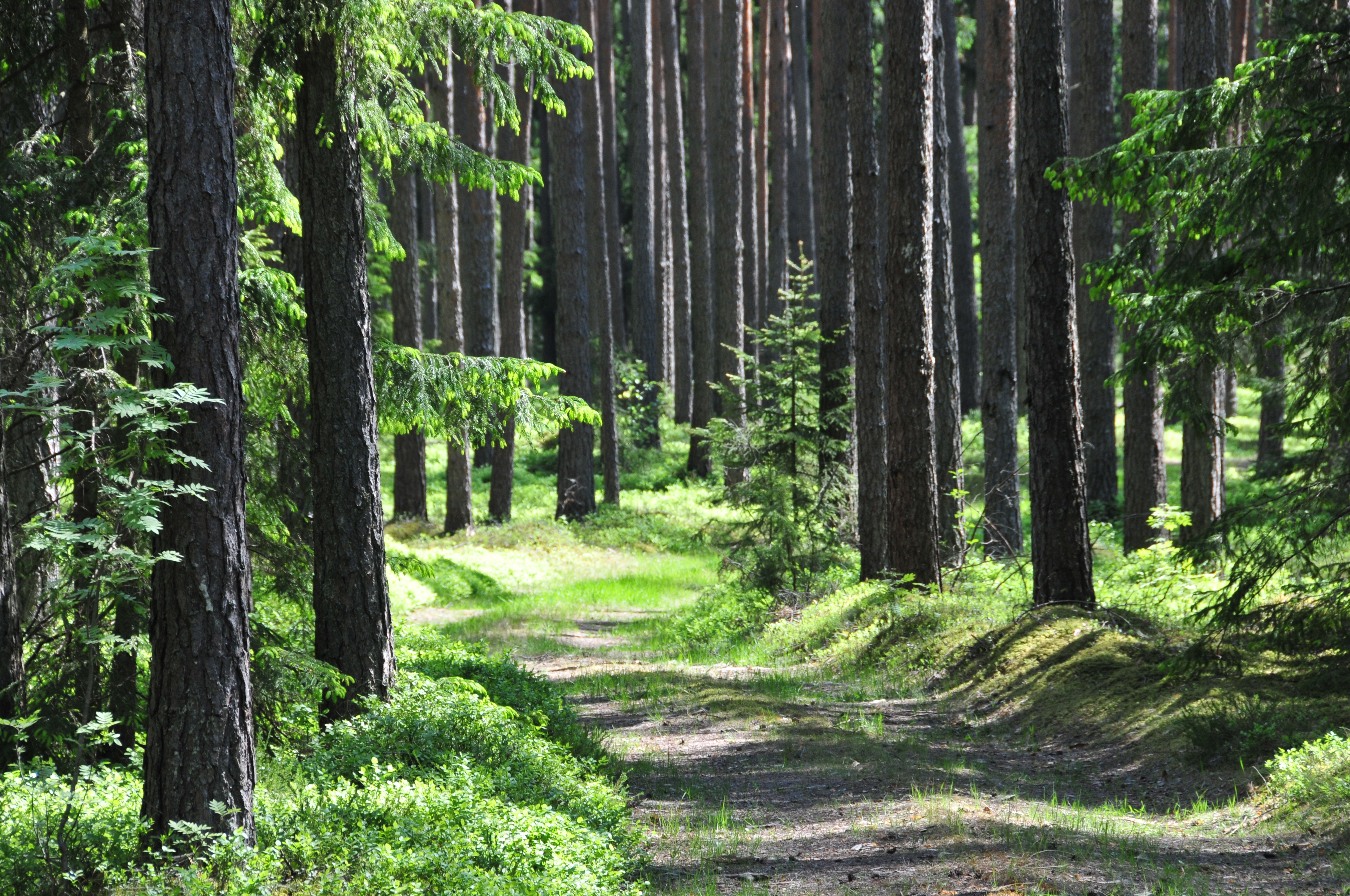 Mežs Baldones apkārtnē